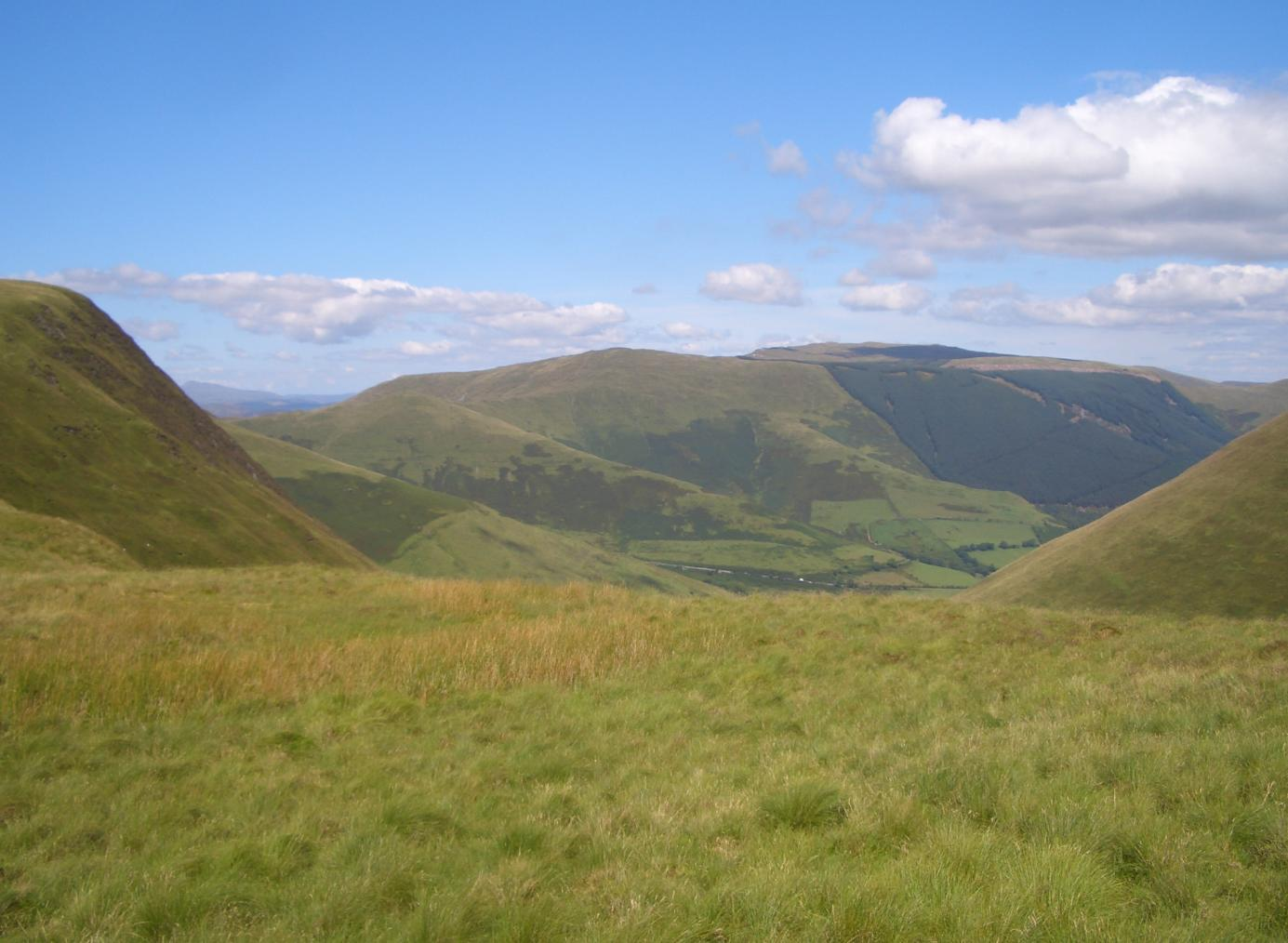 bryn fforchog